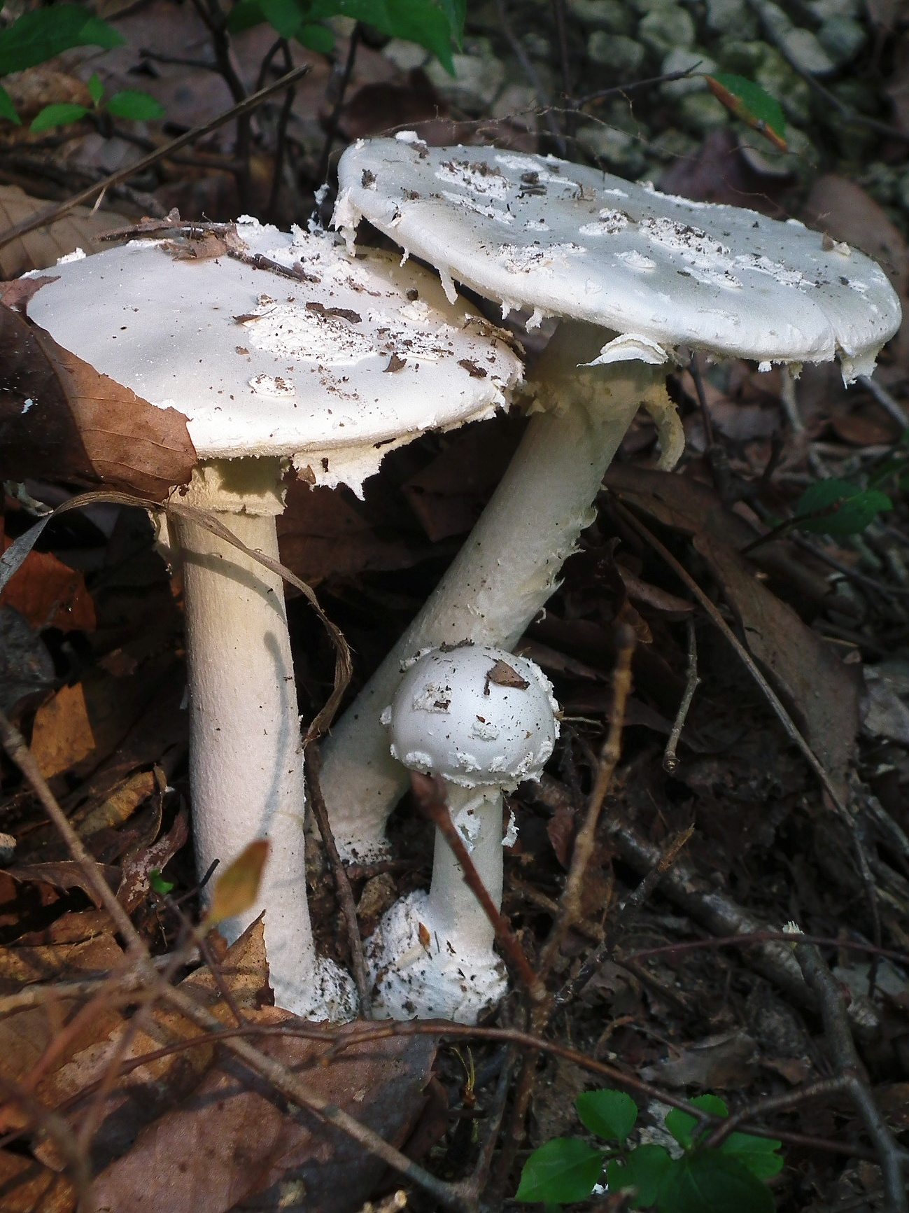 Amanita kotohiraensis コトヒラシロテングタケ（琴平白天狗茸 ） Akiyoshi Matsuoka